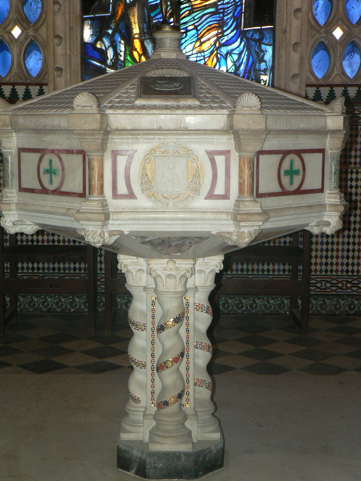 Doopfont van de Catedral Santa María La Menor, Santo Domingo